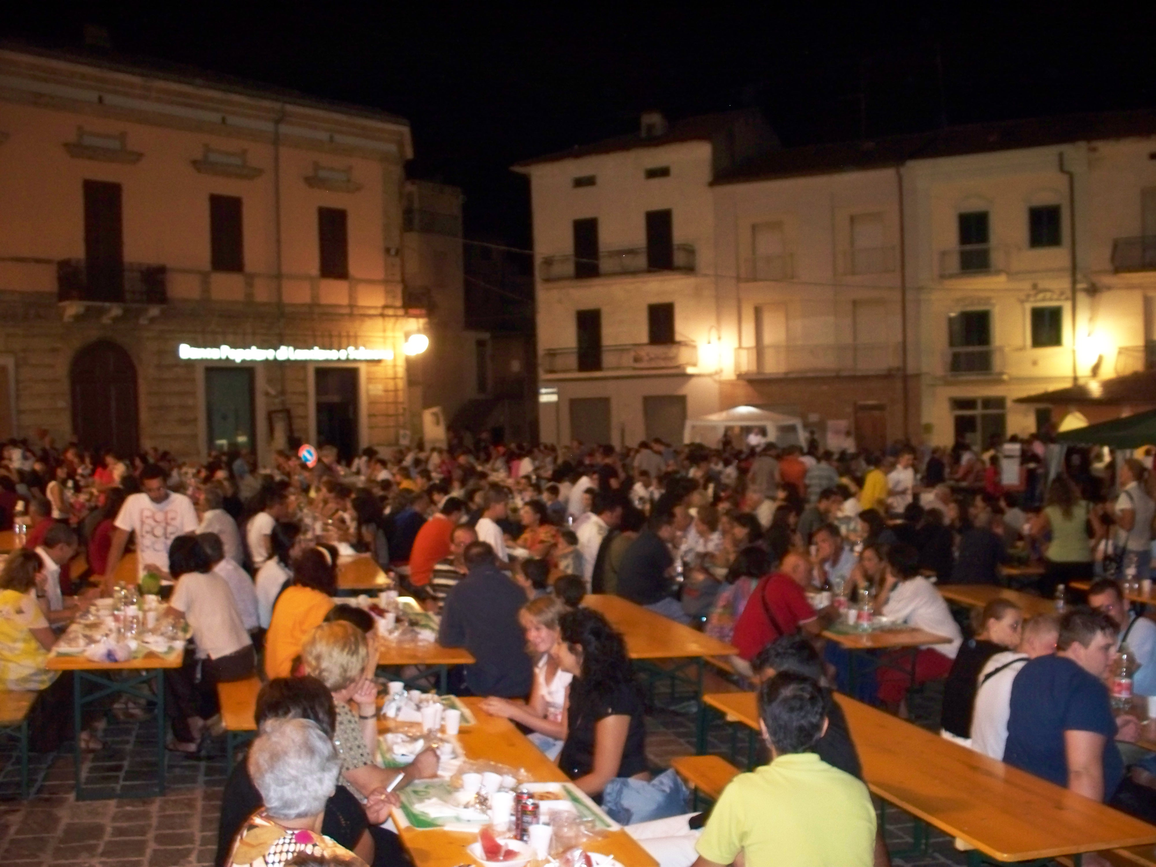 autore della foto